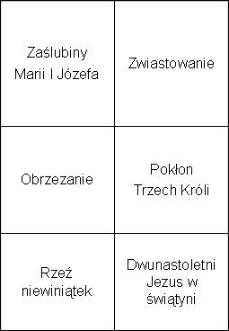 opis pól dawnego ołtarza głównego kościoła św. Jana w Stargardzie Szczecińskim.